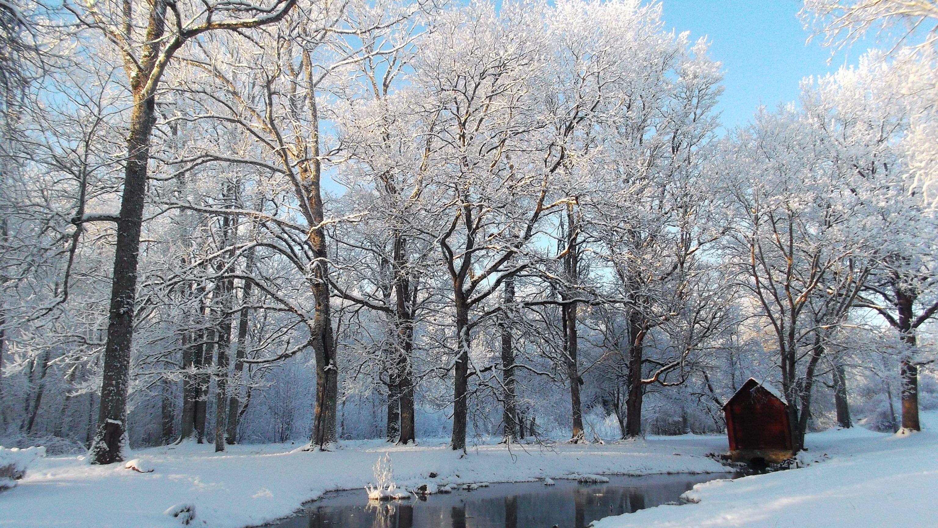 Foto on jäädvustatud 2014. aastal.